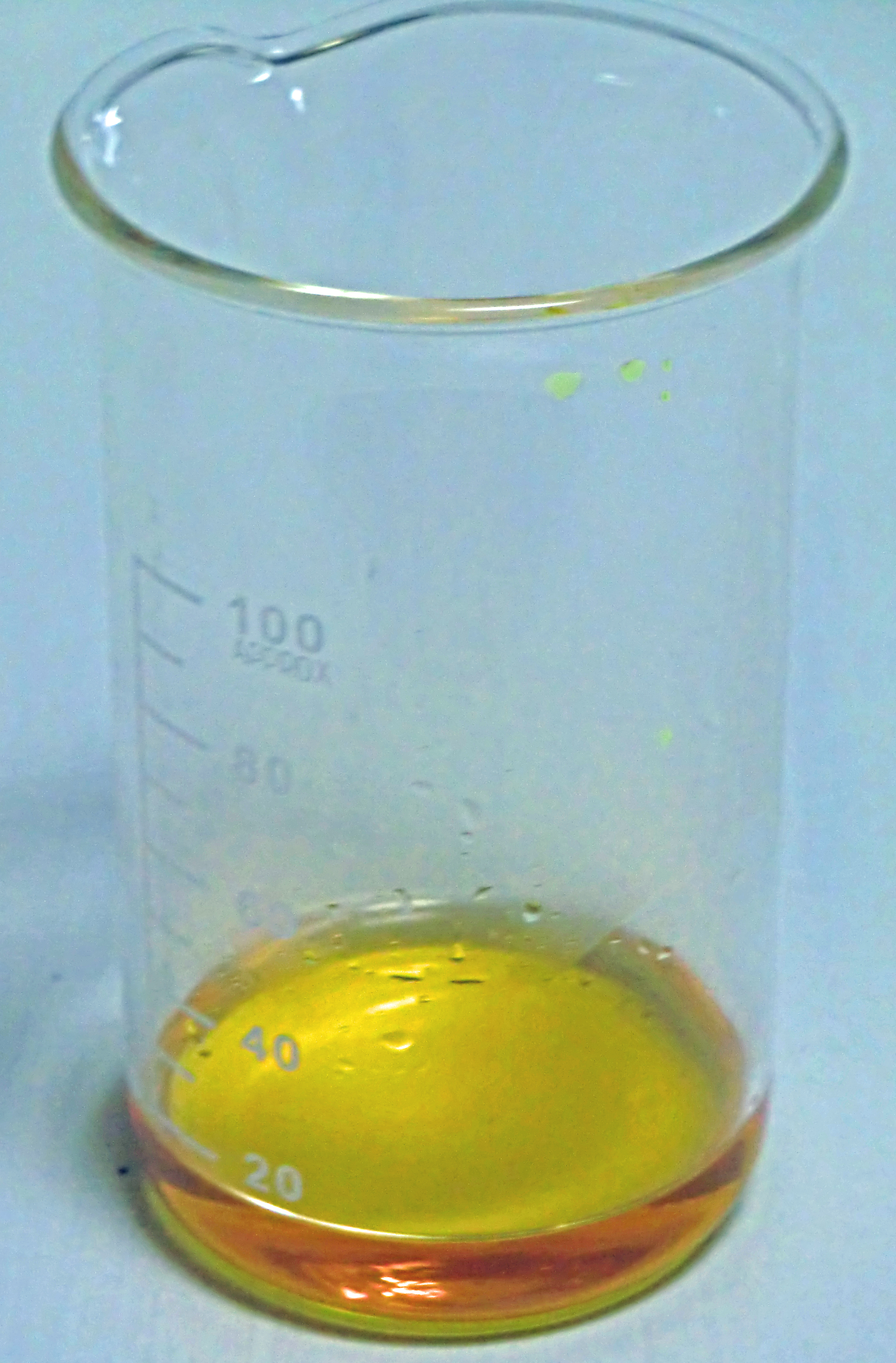 王水